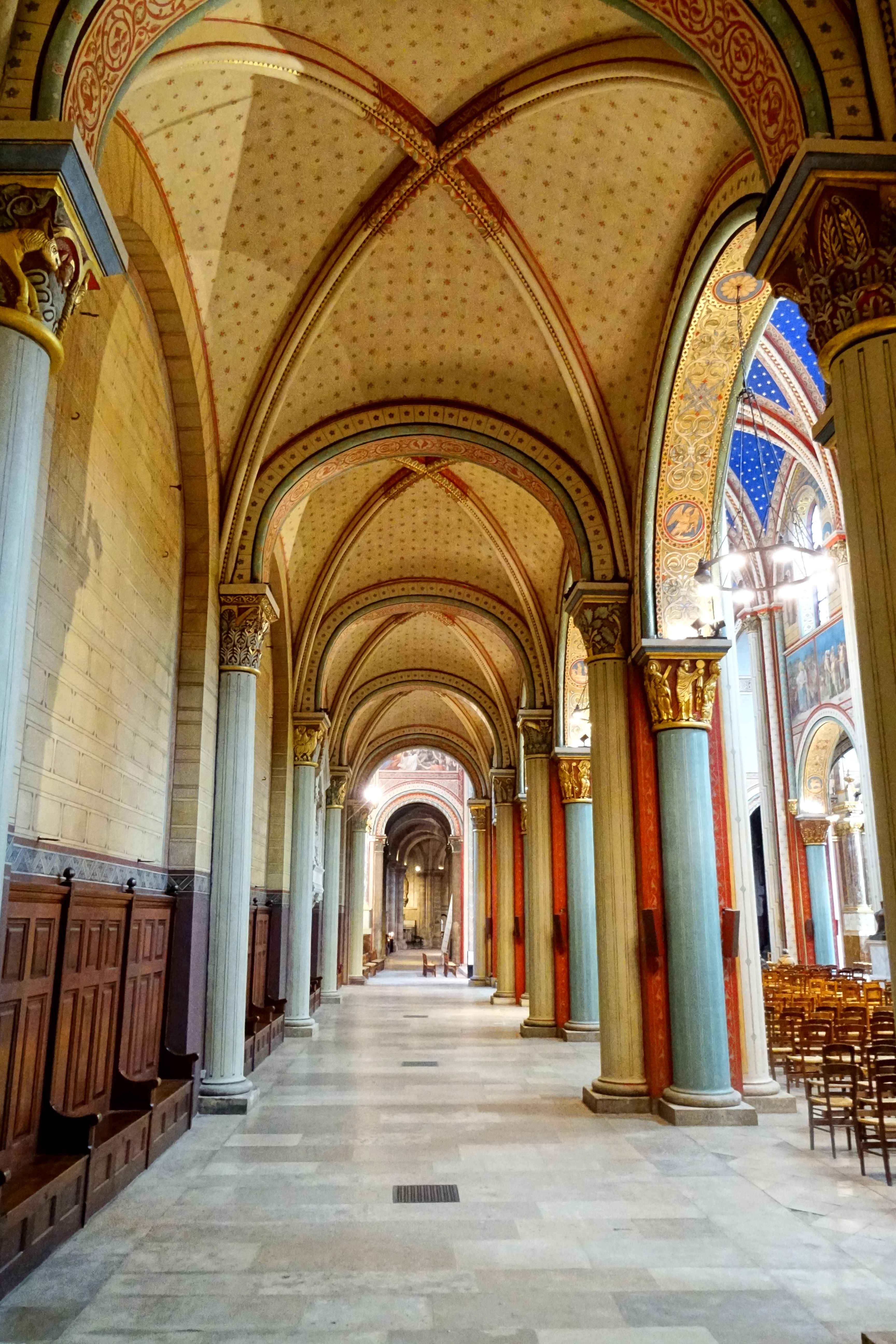 Le bas-côté nord de la nef.